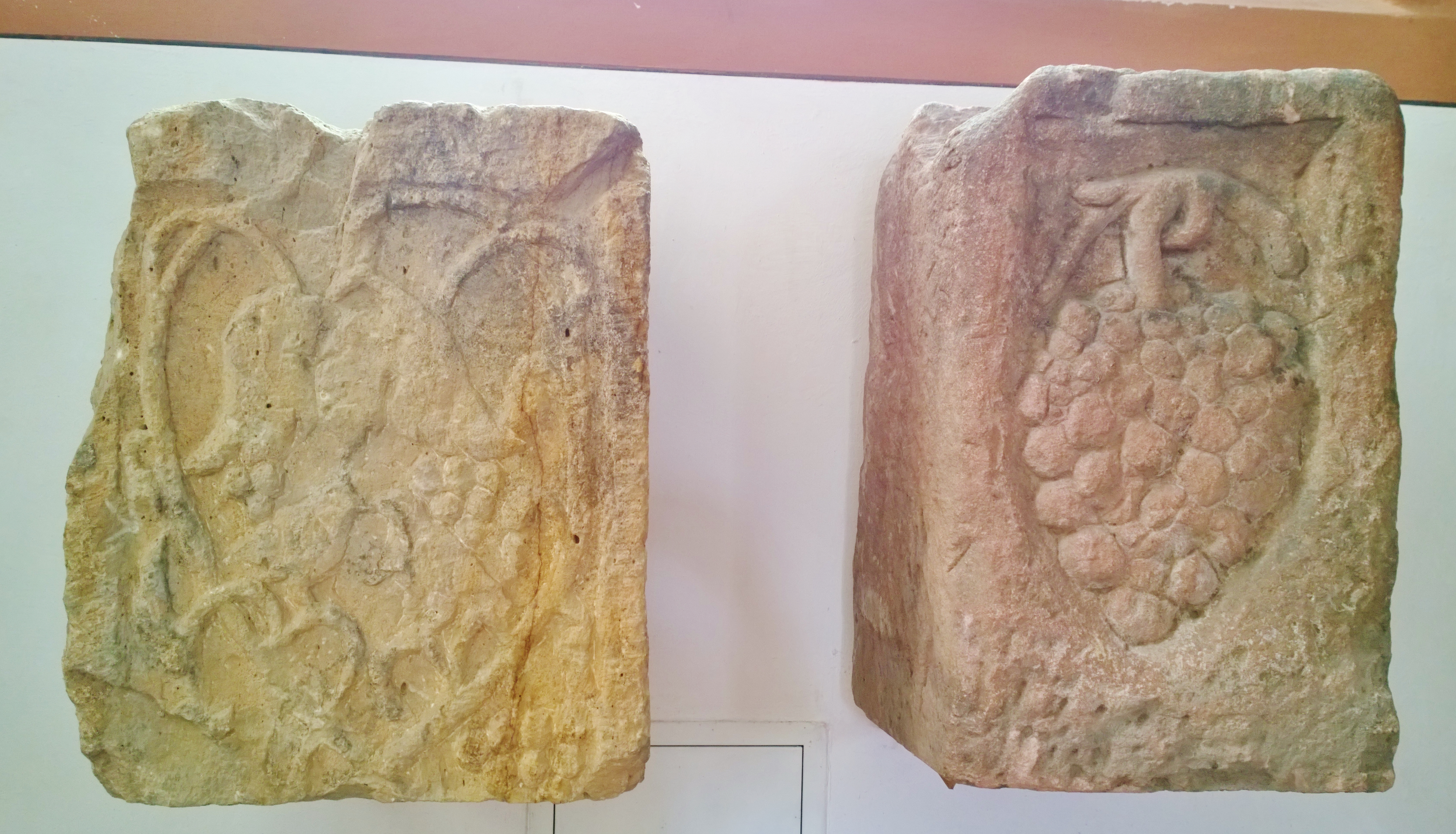 Die zwei römischen Traubensteine in der Stadtkirche Groß-Umstadt, die Symbol und Logo des Umstädter Museumsvereins sind und 1968 bei der Renovierung der Stadtkirche gefunden und Teil der Funde zur römischen villa rustica in und unter der Stadtkirche sind.